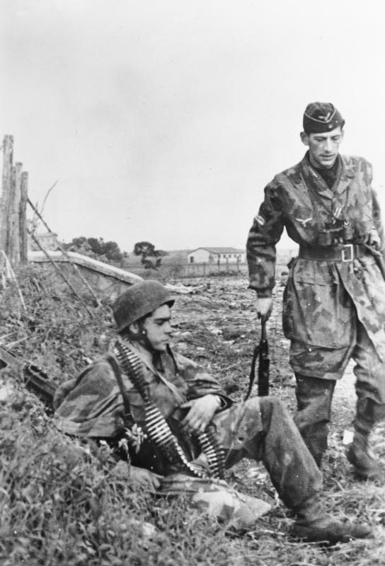 Vom Kampf unserer Fallschirmjäger im Landekopf Nettuno. Nach einem erfolgreichen Angriff auf eine Anhöhe ist eine kurze Schnaufpause eingetreten. Die Schwere des überstandenen Sturmes ist aus den Gesichtern der Männer zu ersehen. PK-Aufnahme Kriegsberichter [Toni] Schneiders 17.2.44 [Herausgabedatum] (00588-44)